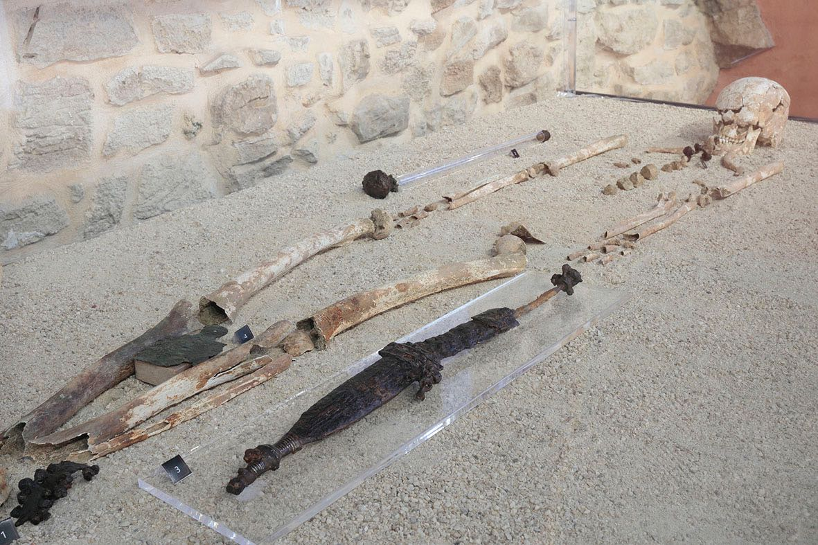 la tomba del "giovane guerriero" una delle più interessanti della collezione archeologica